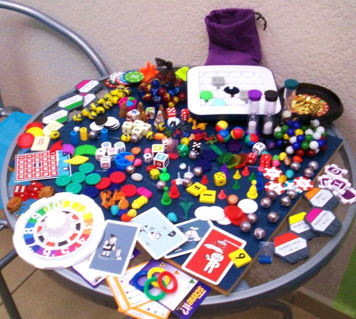 Ludoteca iniciada por el M.C.D. y profesor, Rafael Chávez Rivas, y que pretende ser la punta de lanza en cuanto a generación e inventiva original de juegos de mesa en México.